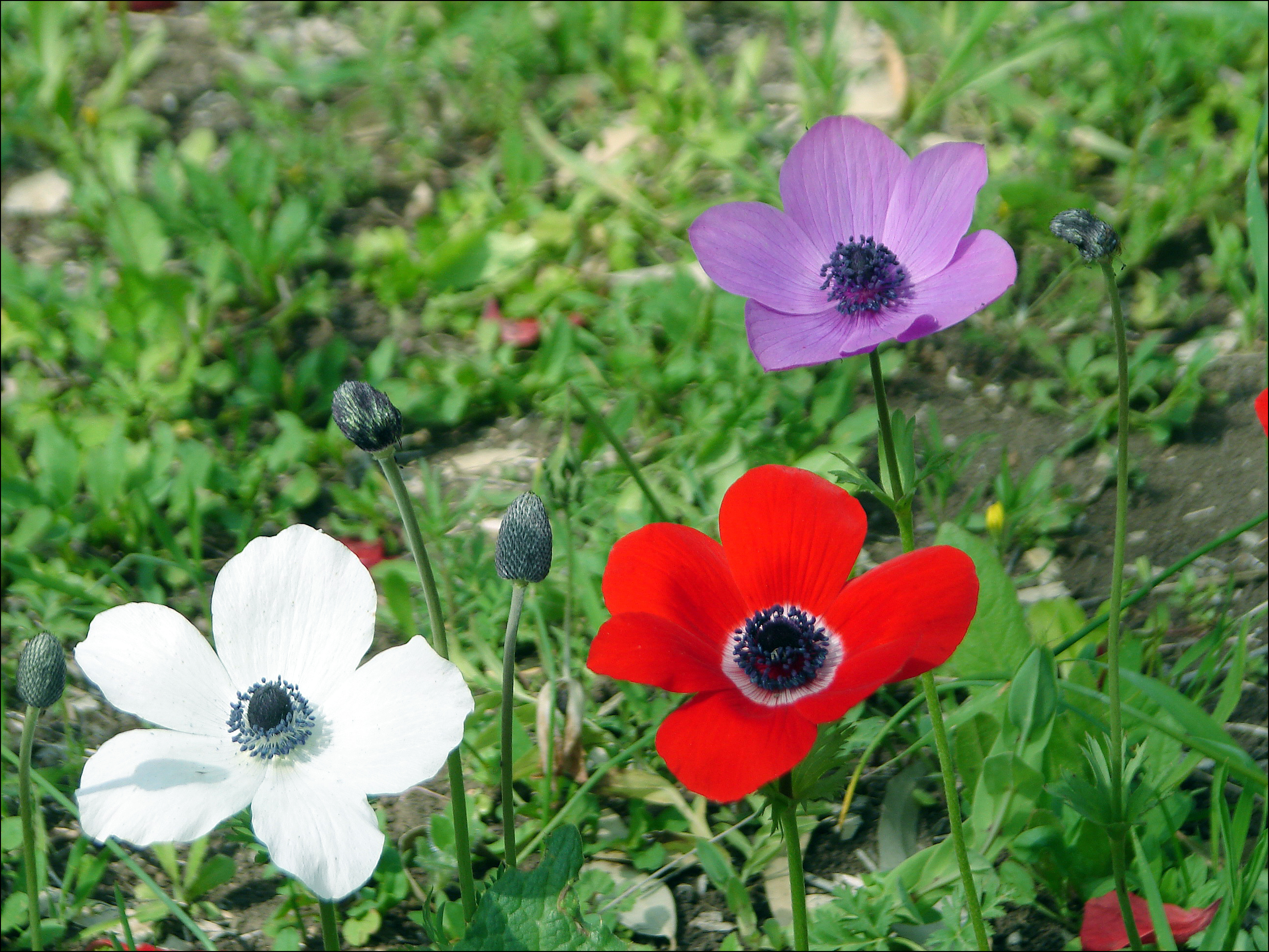 Anemones near Megiddo, Israel Anemone coronaria